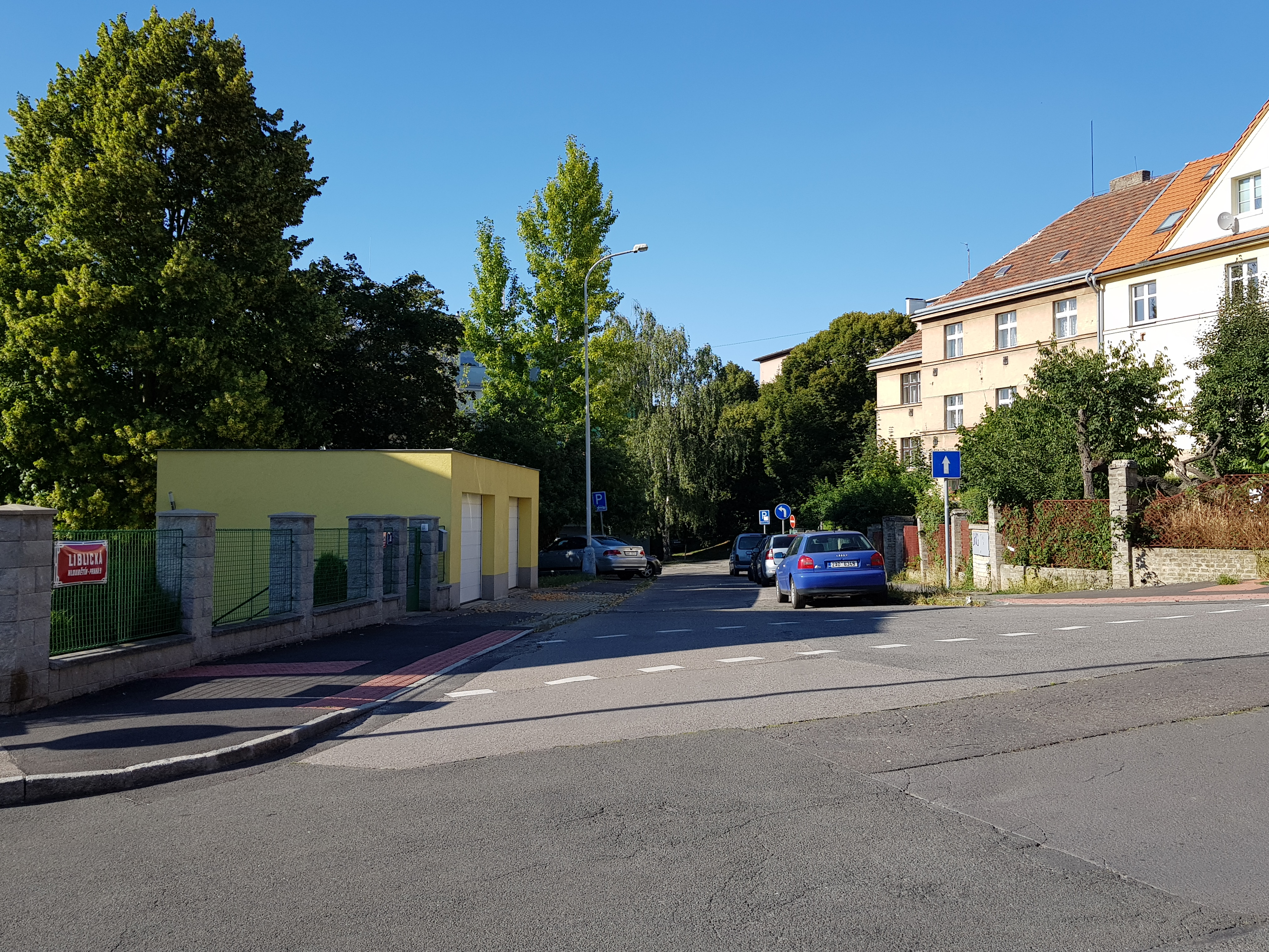 Ulice Liblická, Praha 14-Hloubětín, pohled od ulice Klánovická na sever